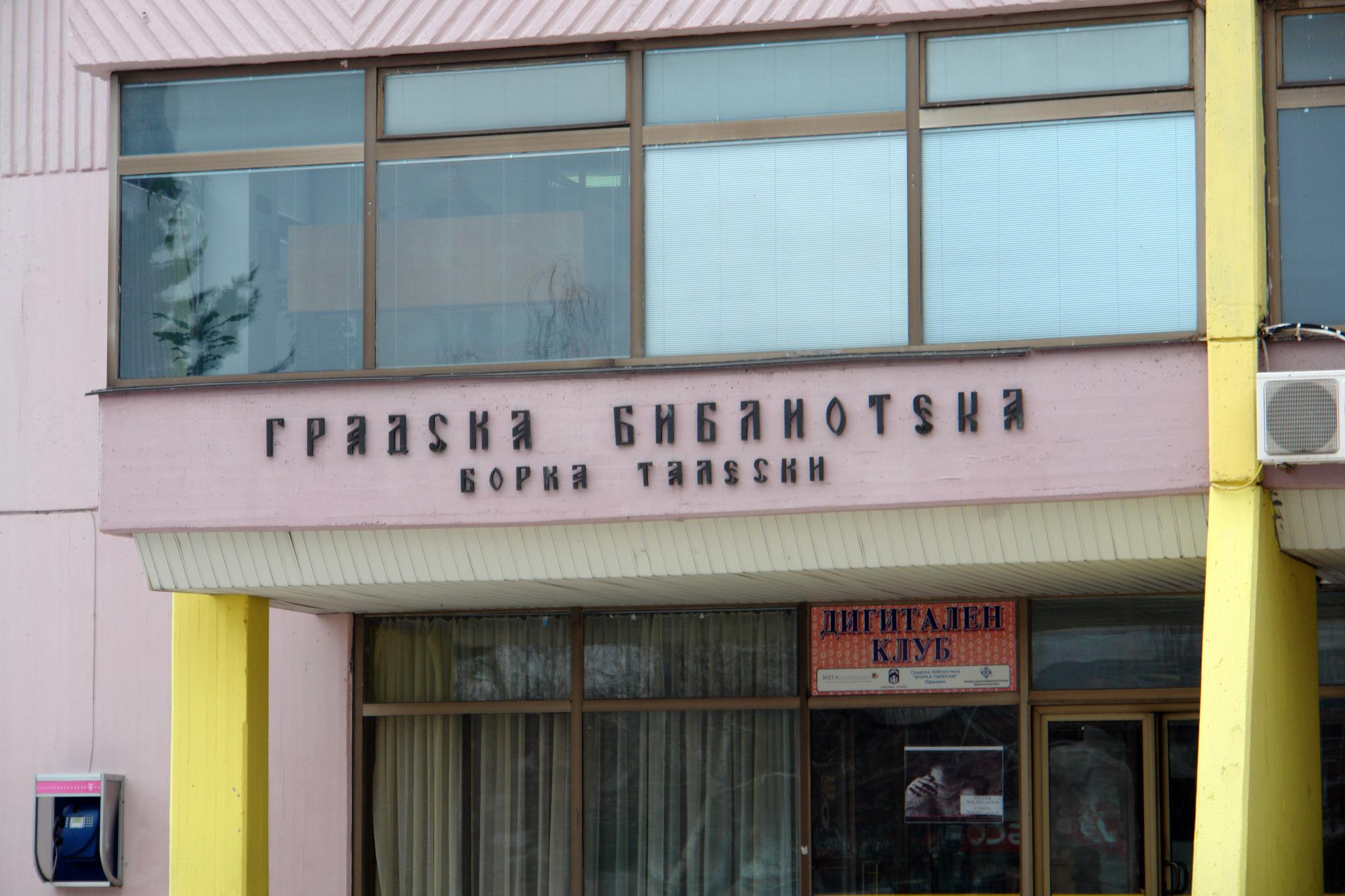 Градска библиотека „Борка Талески“- Прилеп